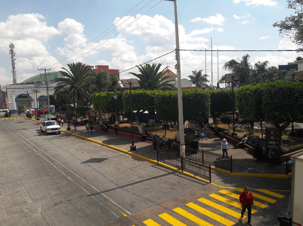 San Pablo del Monte, Tlaxcala (rodolgo.gc)